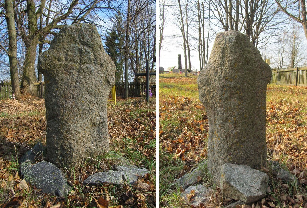 Прыбалавічы. Царква